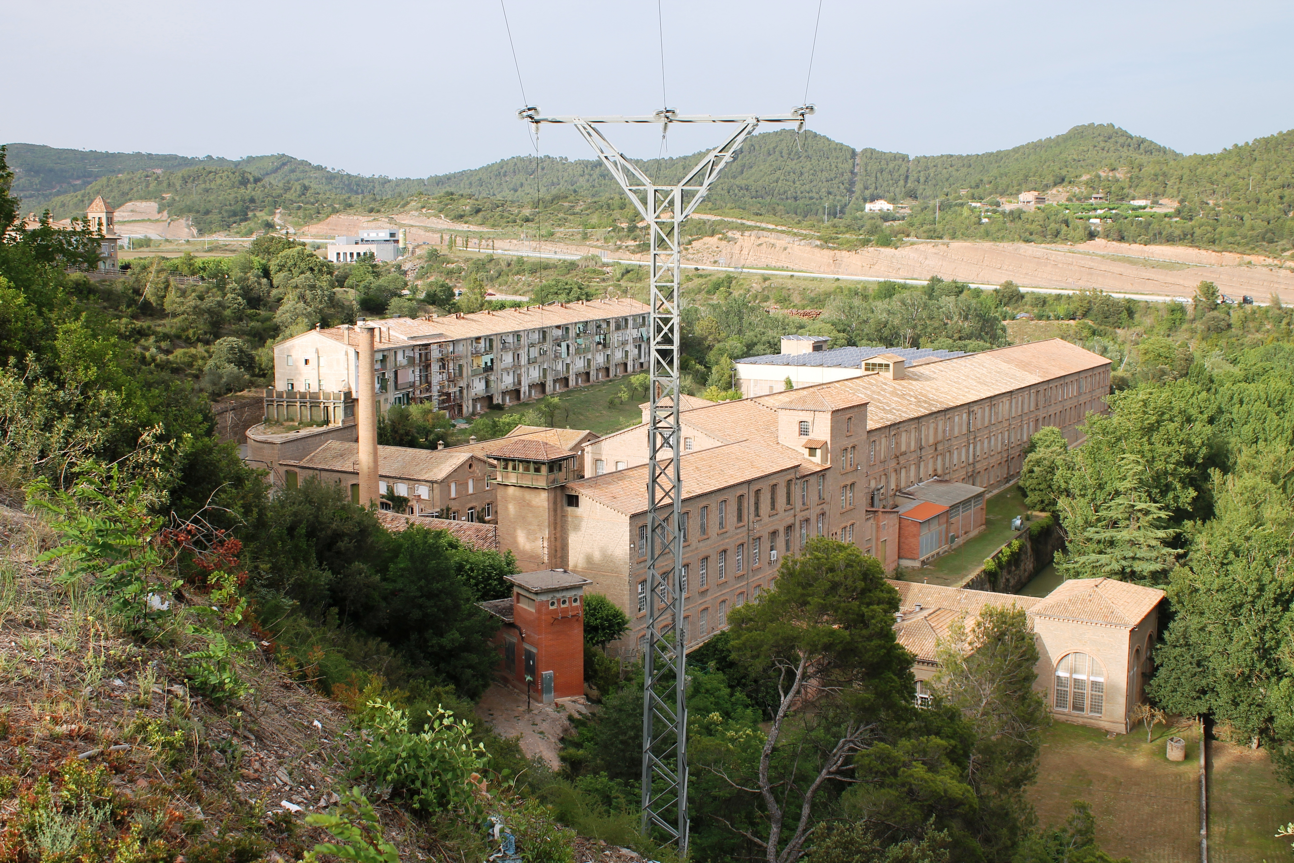 Fàbrica i pisos de la colònia de Cal Marçal.